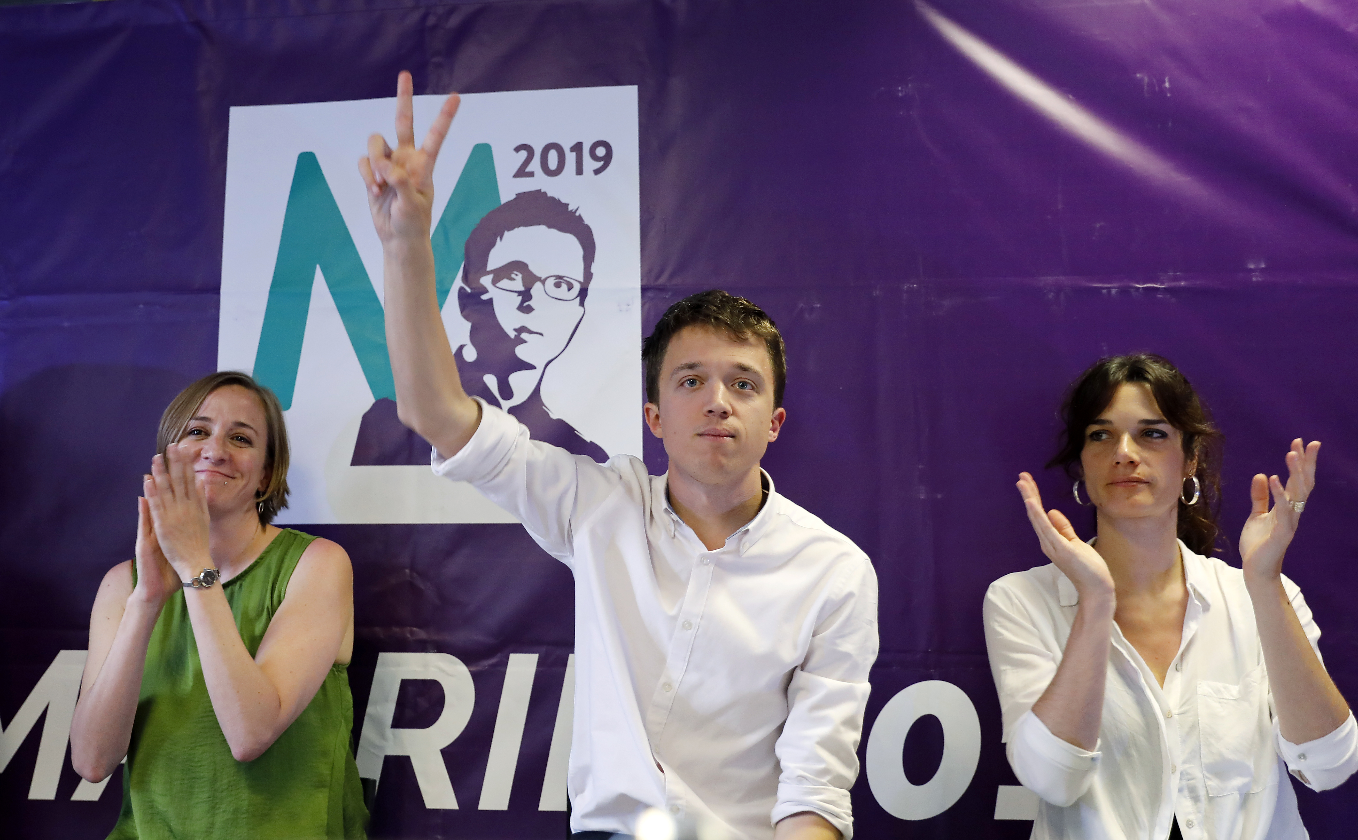 Tania Sánchez, Íñigo Errejón y Clara Serra, en el acto de las primarias de Podemos en Pozuelo.